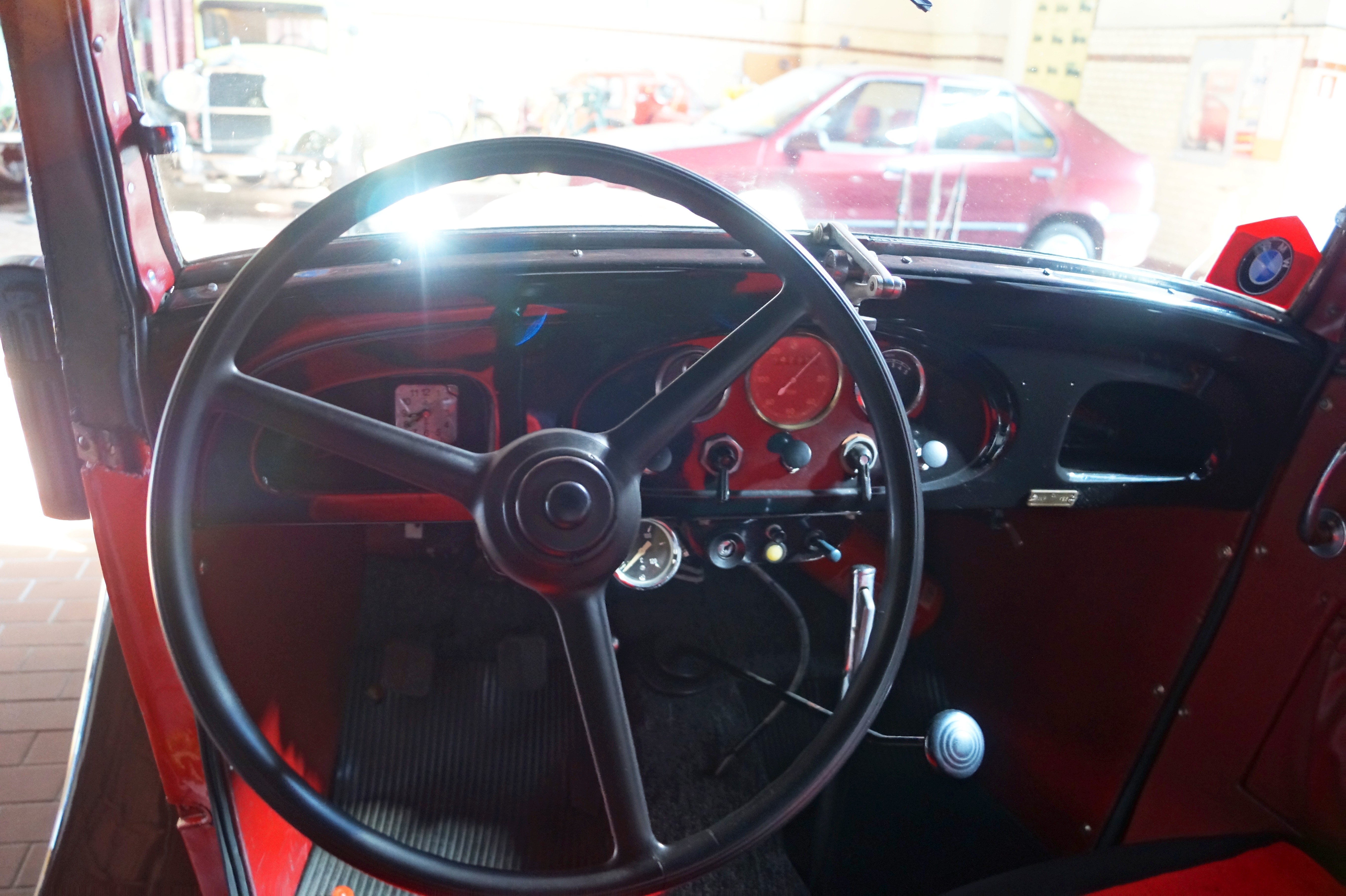 This photo was taken during Automotive Wikiexpedition 2016 set up by Wikimedia Polska Association. You can see all photographs in category Wikiekspedycja motoryzacyjna 2016. English | Polski | +/− Wnętrze auta BMW 309 w Muzeum Pojazdów Zabytkowych w Zabrzu